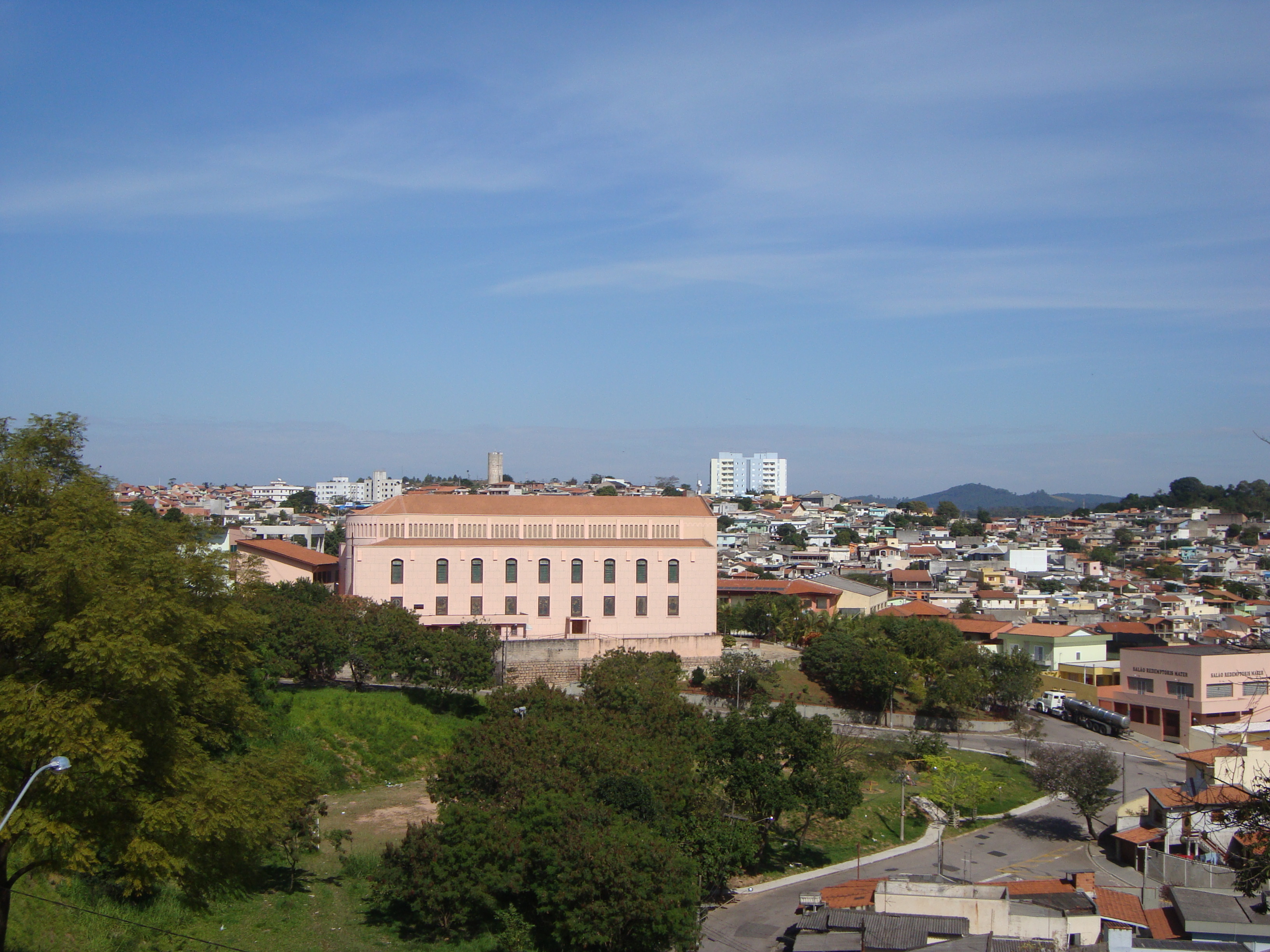 Jardim do lago jundiaí